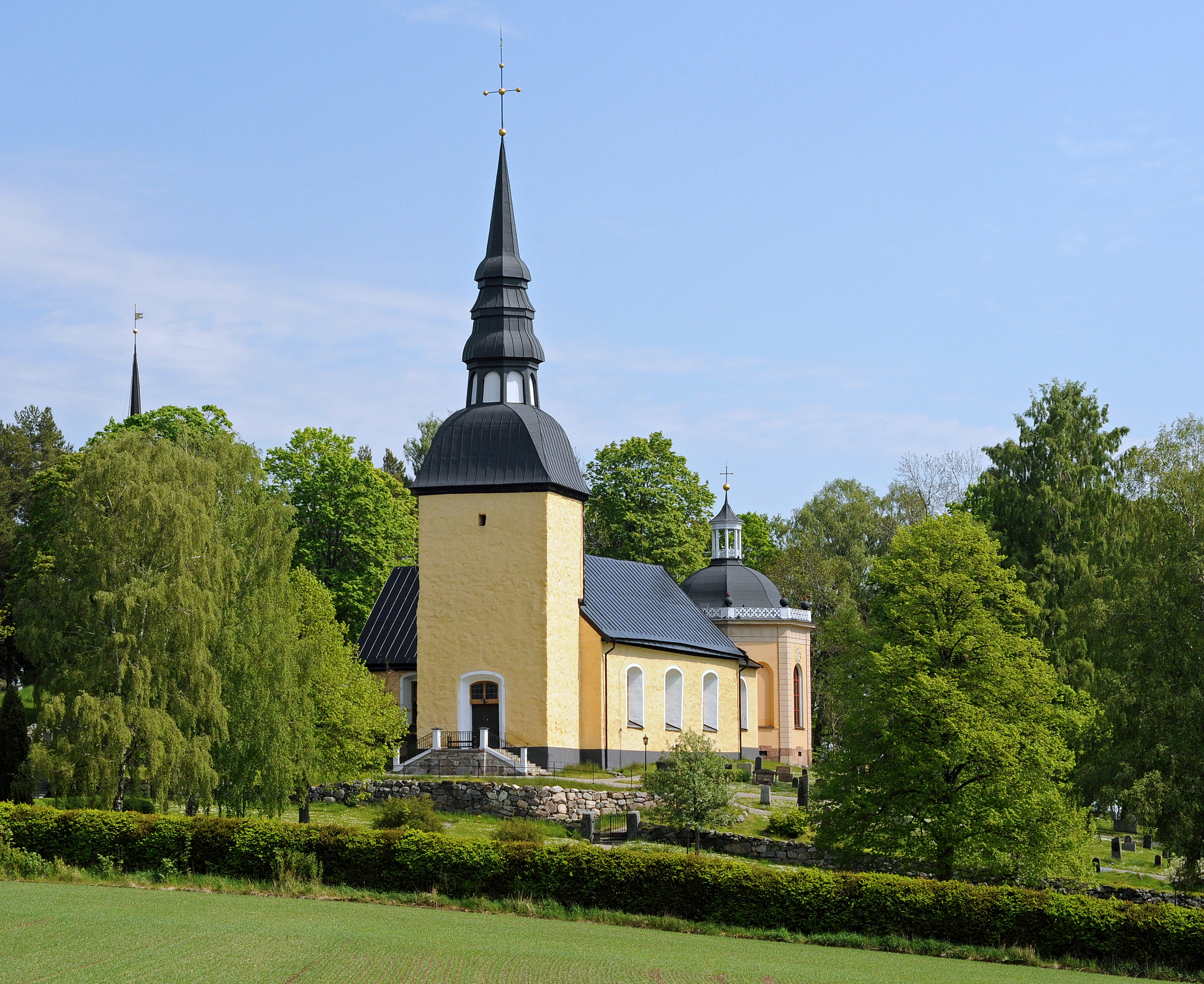 Björnlunda kyrka